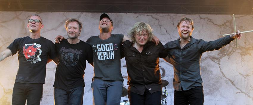 Magtens Korridorer efter deres koncert på Grøn Koncert 2013 i Aalborg.